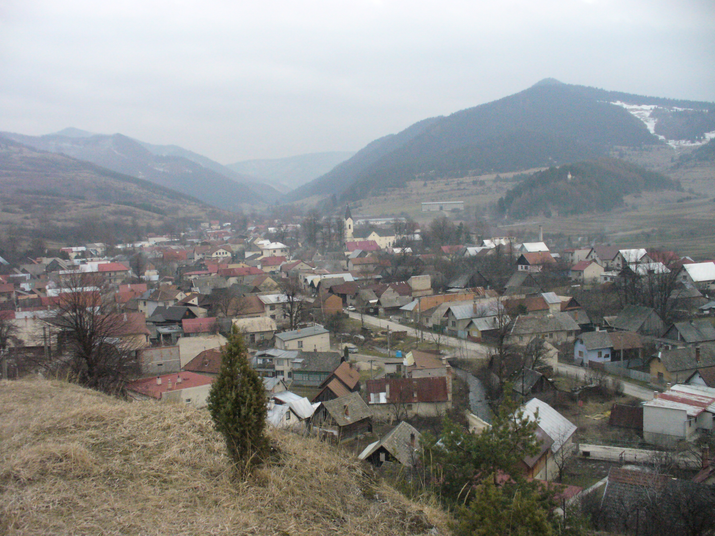 obec Rajecká Lesná.